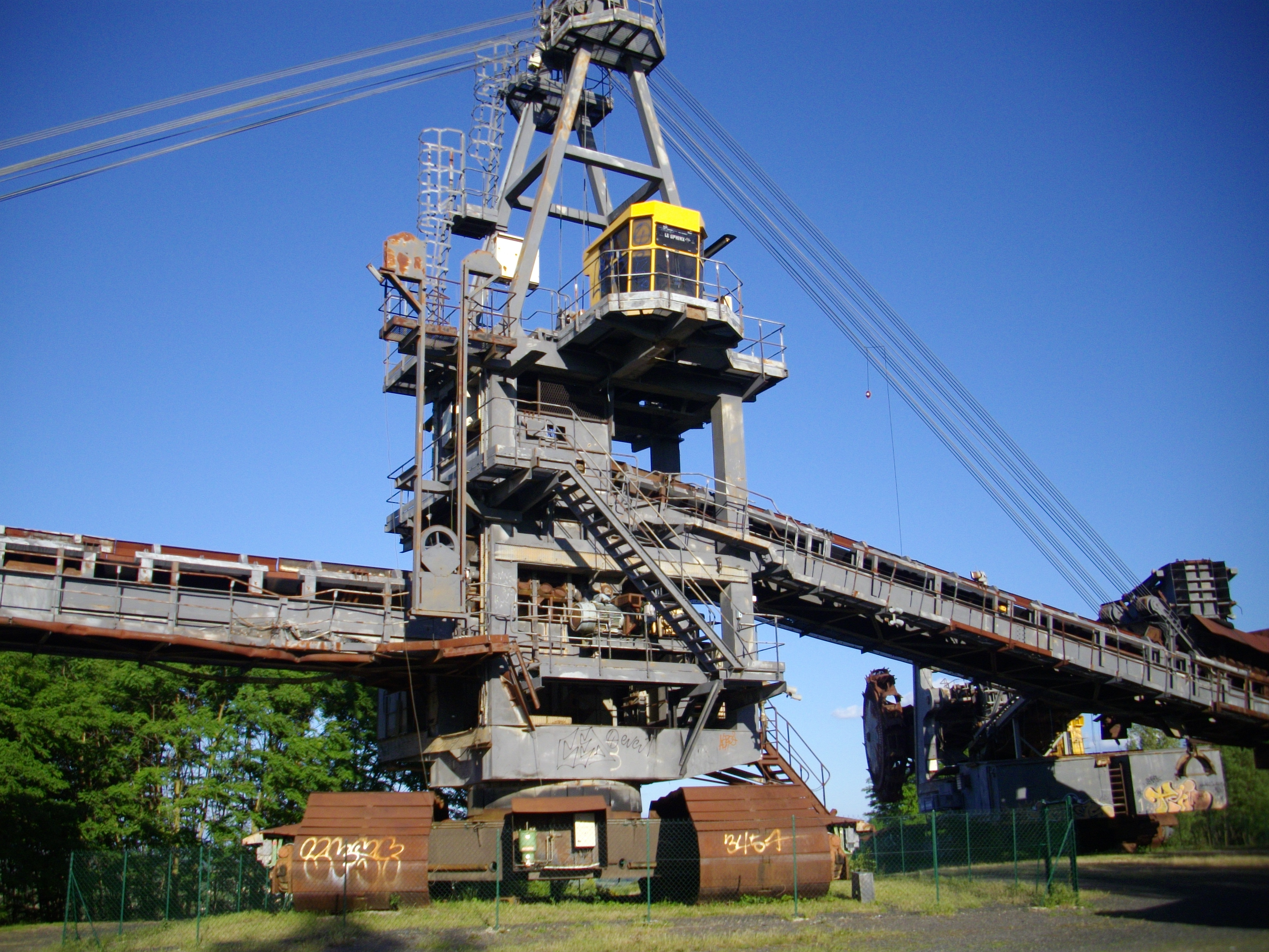 "Parc des Titans", exposition à Cap'Découverte d'engins miniers gigantesques de la mine à ciel ouvert de Carmaux.